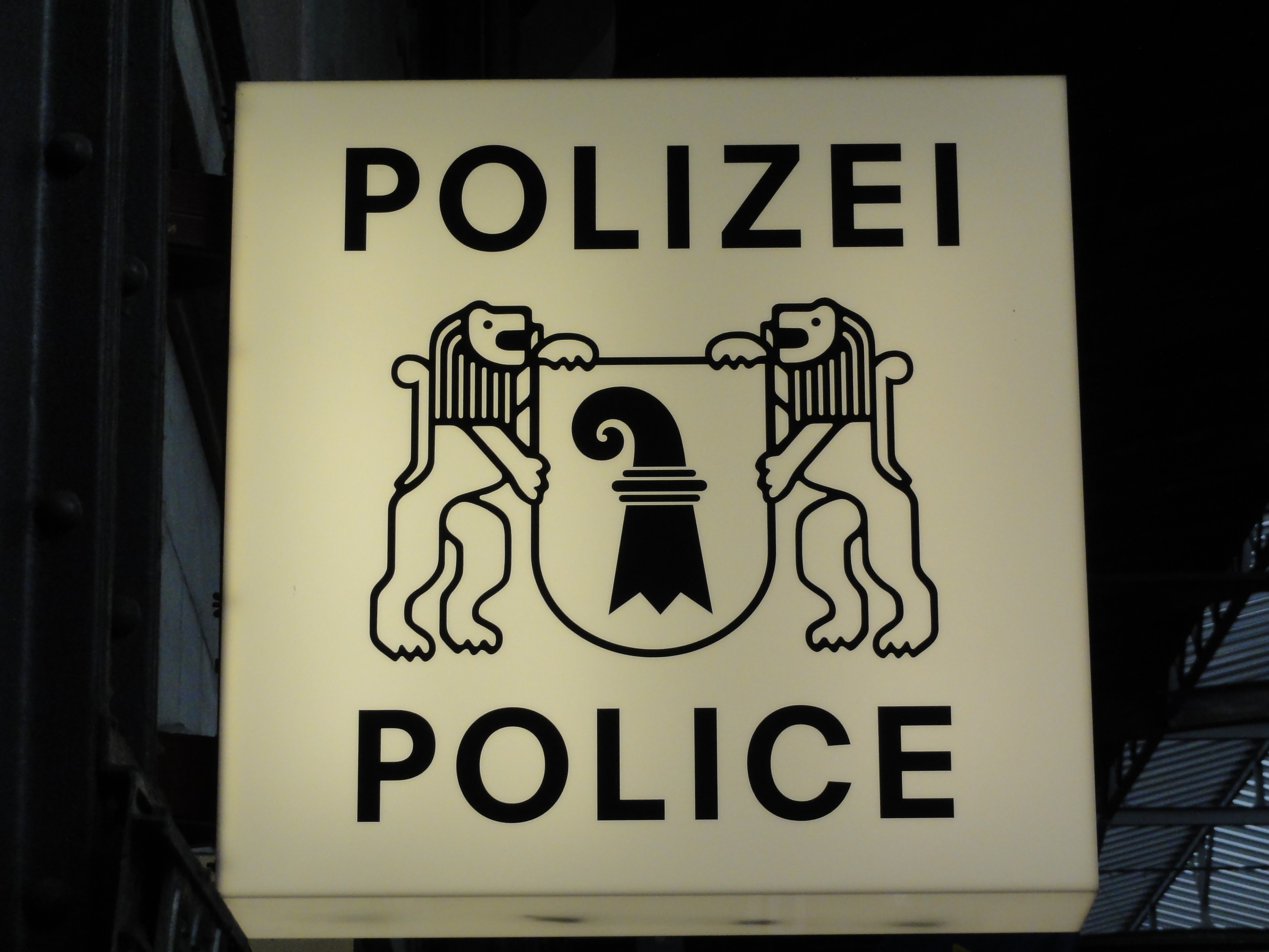 Basel SBB — Schild der Kantonspolizei BS Info GPS data may be inaccurate. EXIF data regarding date and time may be inaccurate.